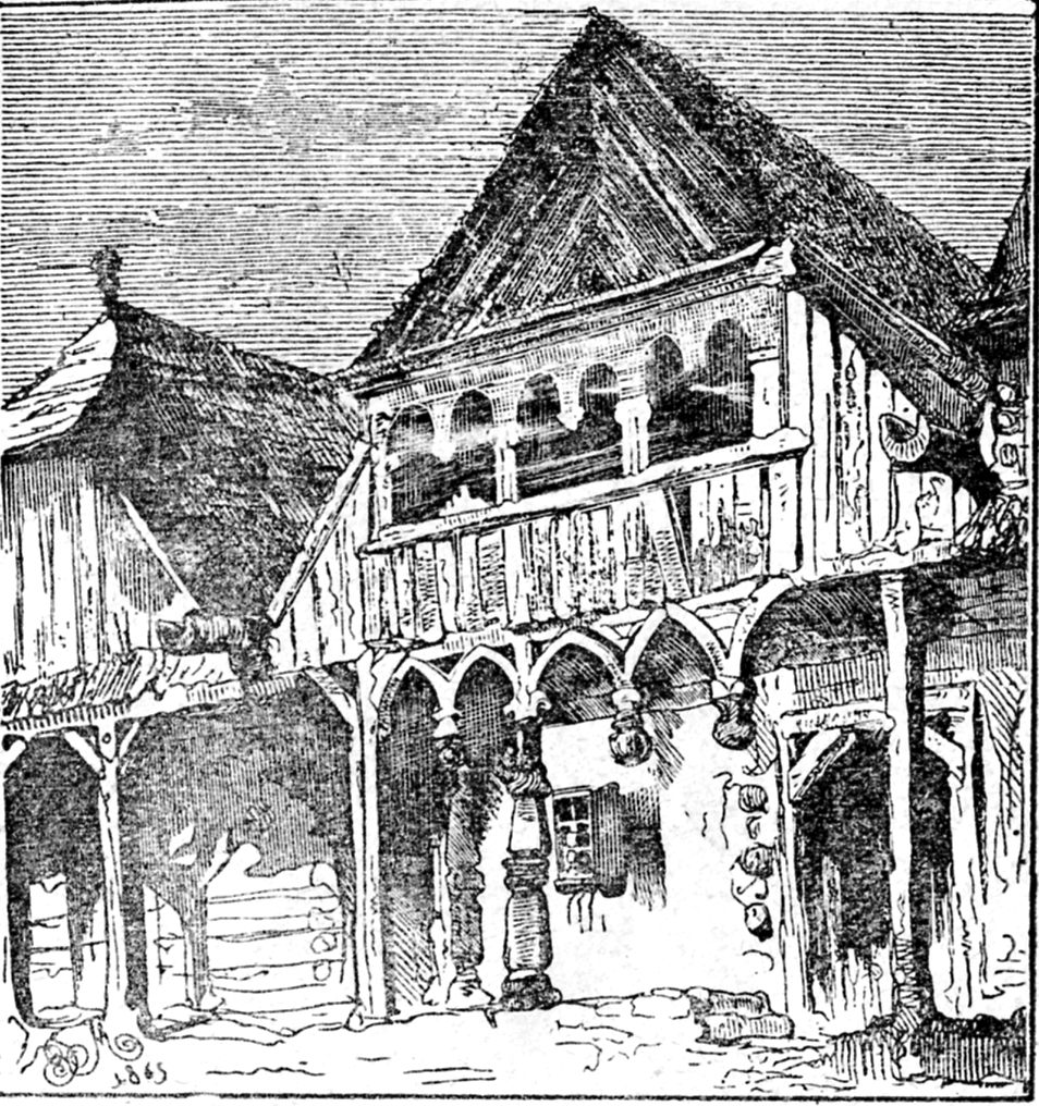 Rysunek Matejki przedstawiający jeden z drewnianych domów w Nowym Wiśniczu przed wielkim pożarem miasta 3 lipca 1863